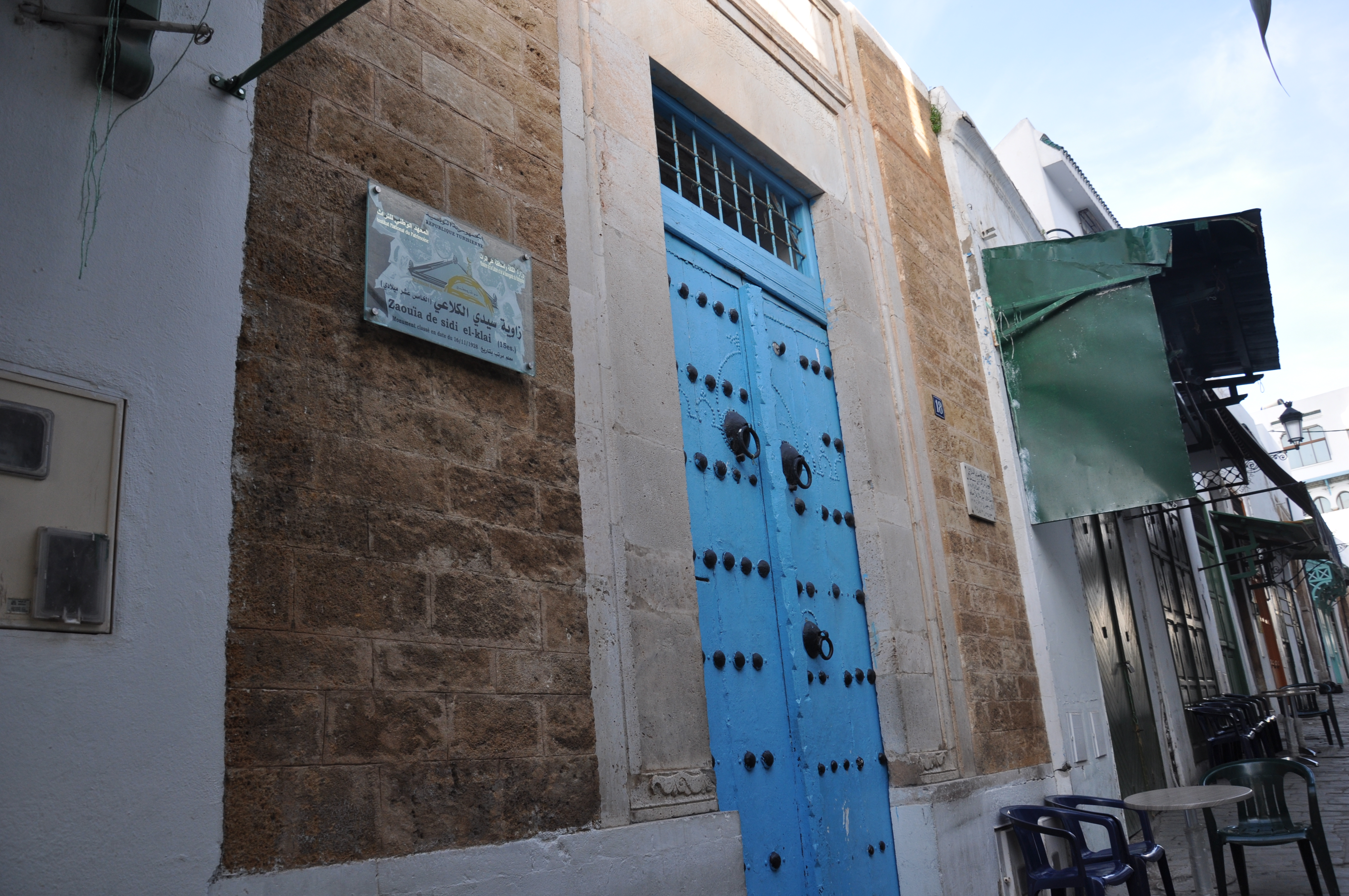 Marabout de Sidi Louklaï